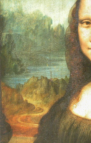 detail: detail background left